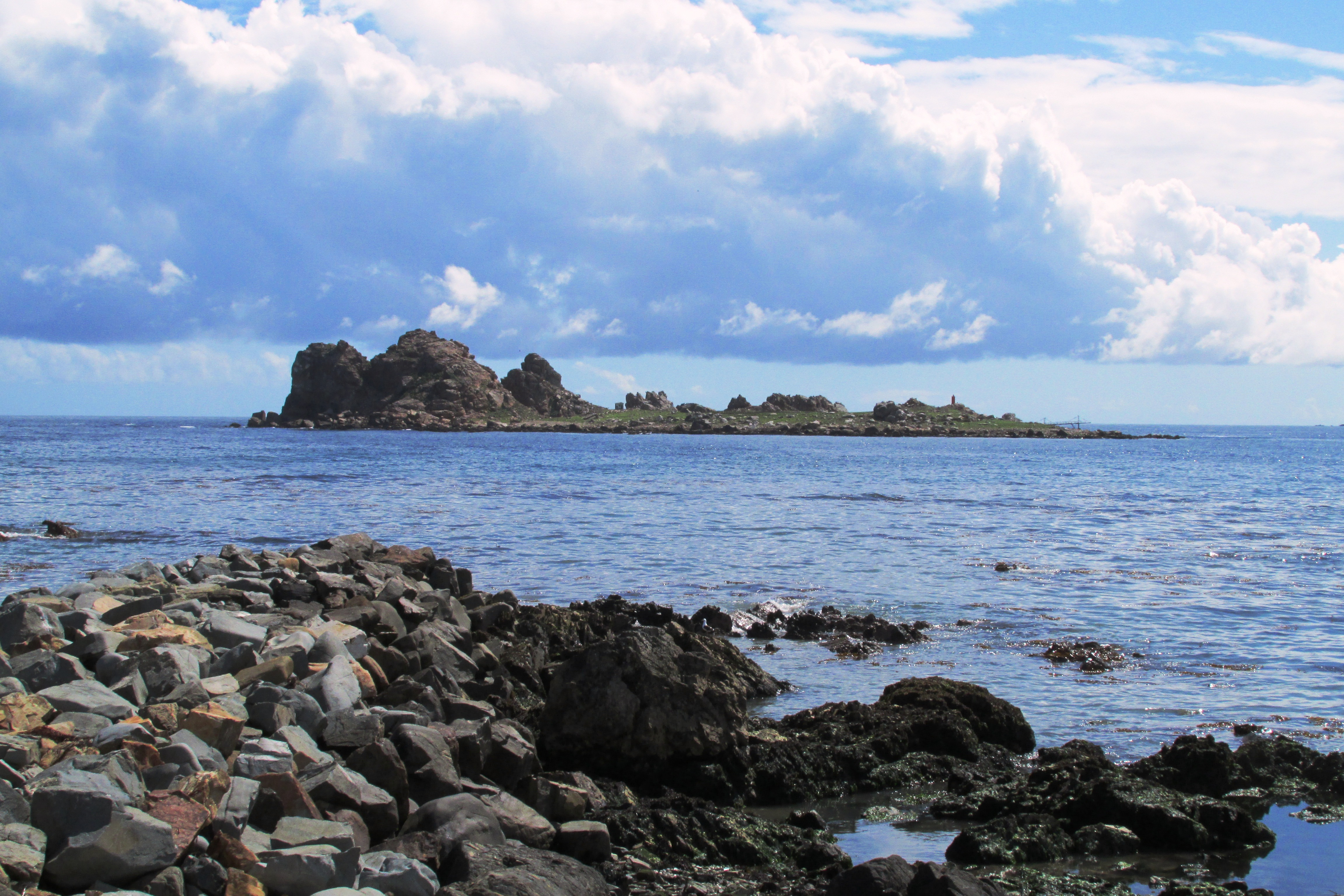 Islote de los Huevos, frente a Los Vilos, región de Coquimbo, Chile